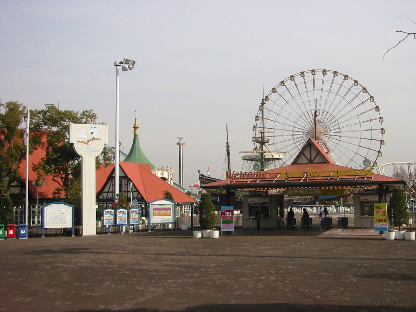 神戸ポートピアランド 正面ゲート Kobe Portopia Land on Port Island, disassemled in August 2006